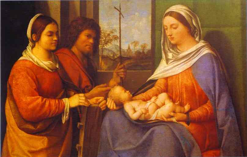 Giorgione - Sacra conversazione.